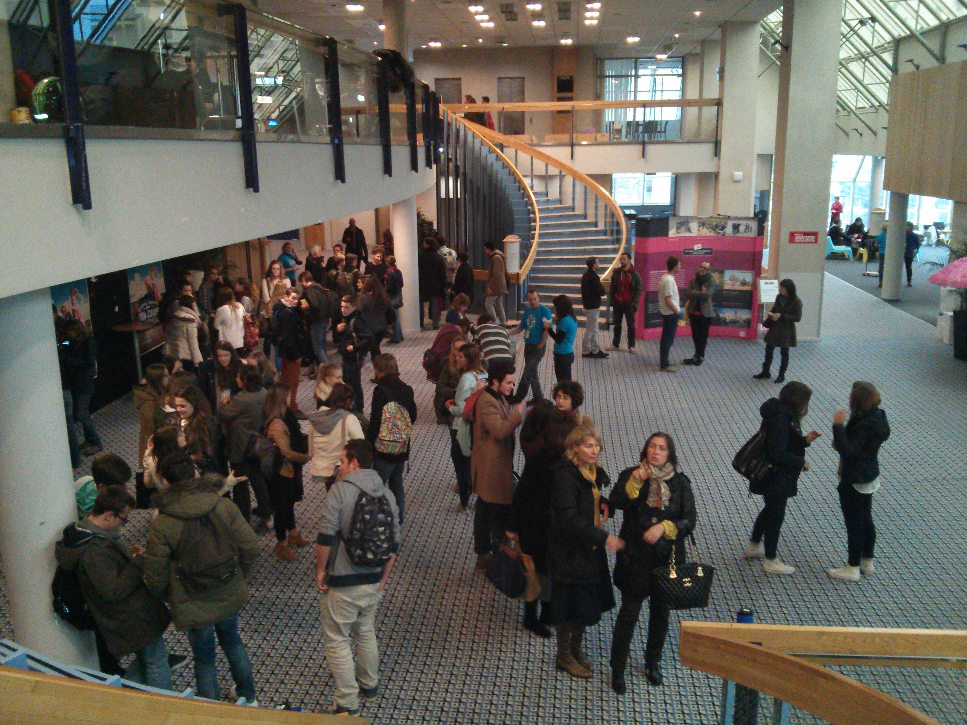 Public lors du Festival Européen du Film Court de Brest